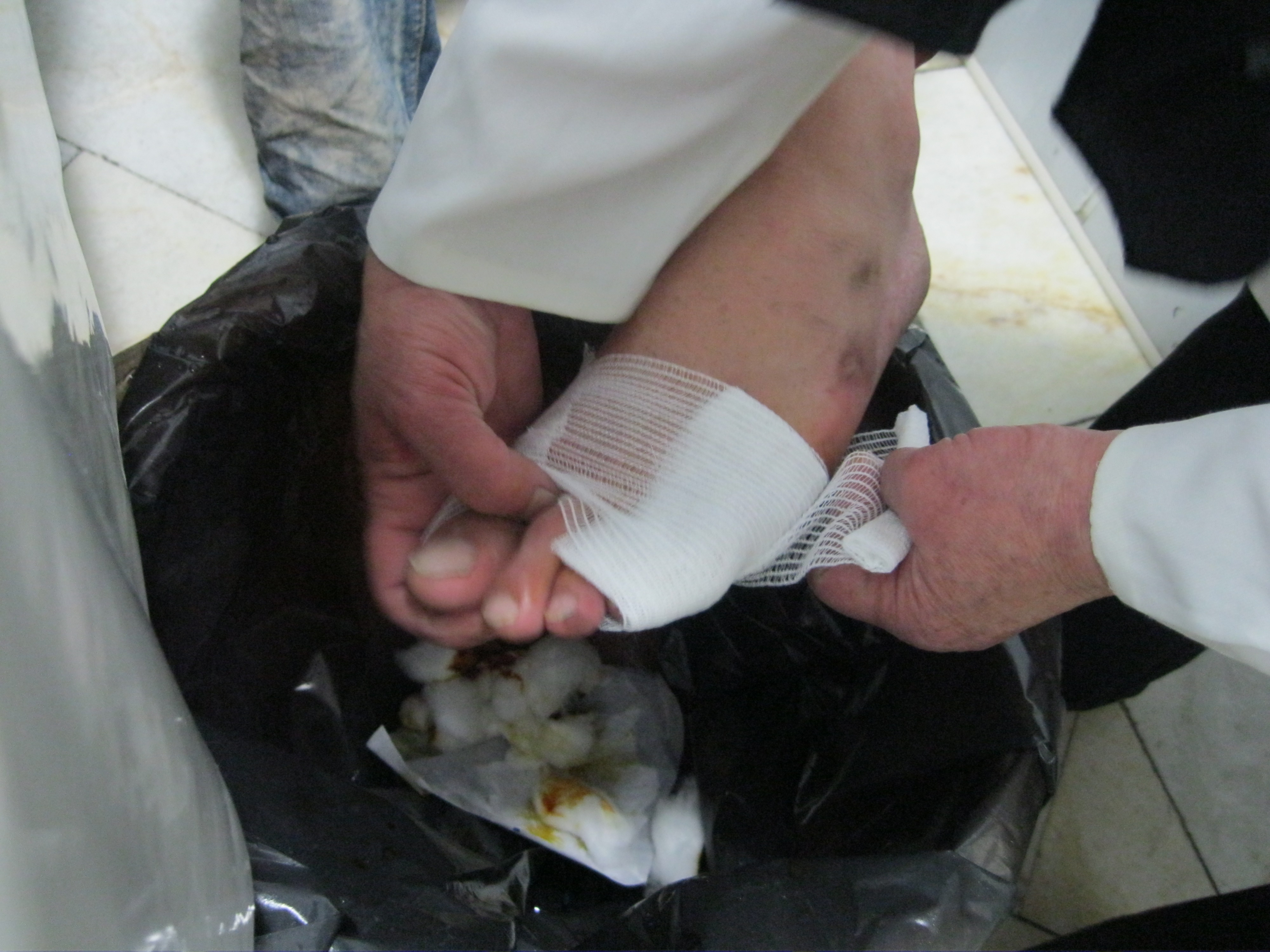 پرستار اورژانس در حال بانداژ پای بیمار